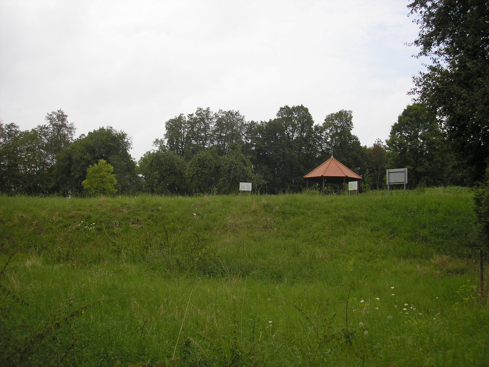 Blick über das Gelände der ehemaligen Raspenburg in Rastenberg (Thüringen).